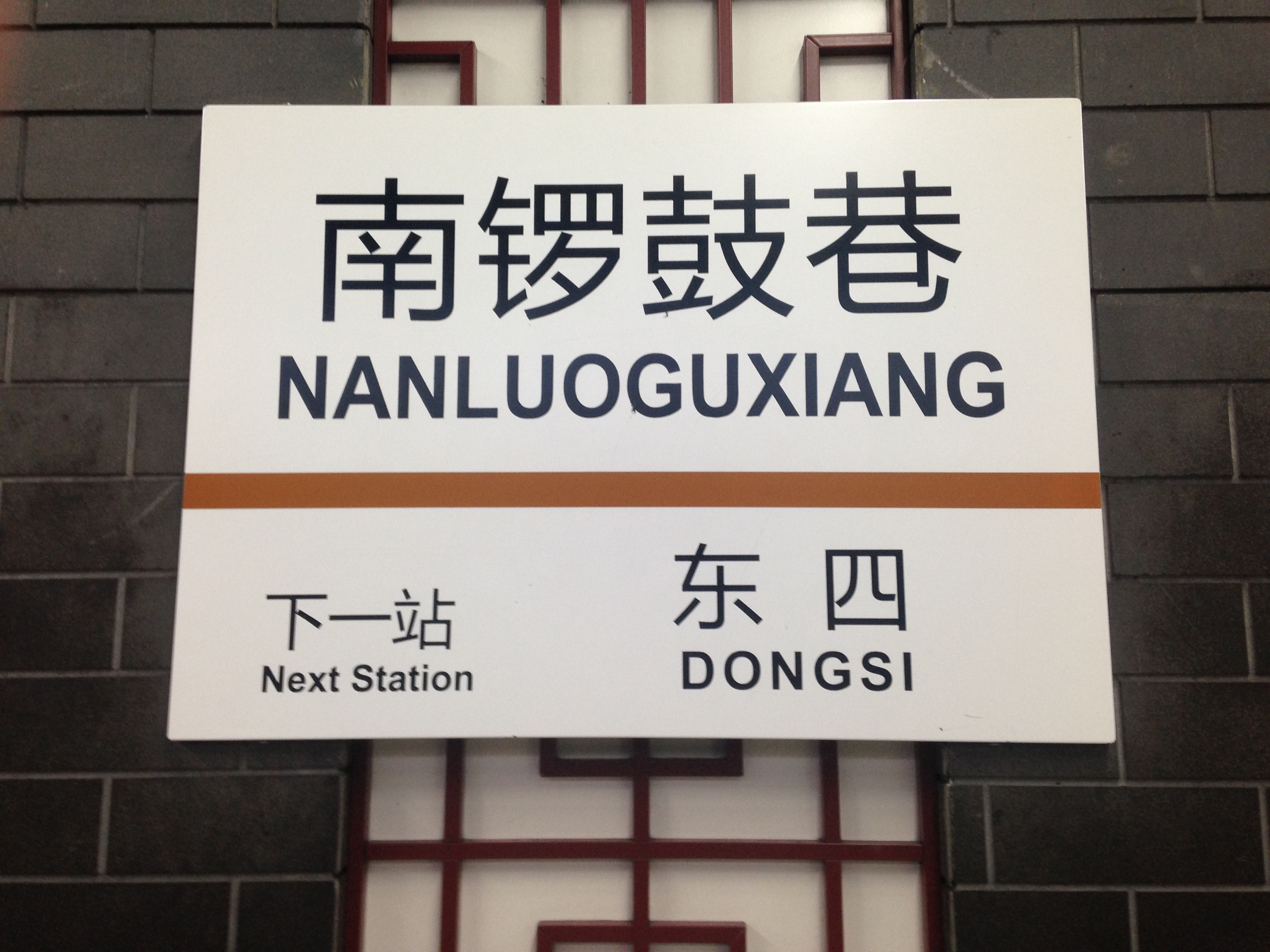 南鑼鼓巷駅(北京地下鉄6号線)の駅名標